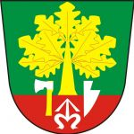 Česky: znak obce Bohuslávky